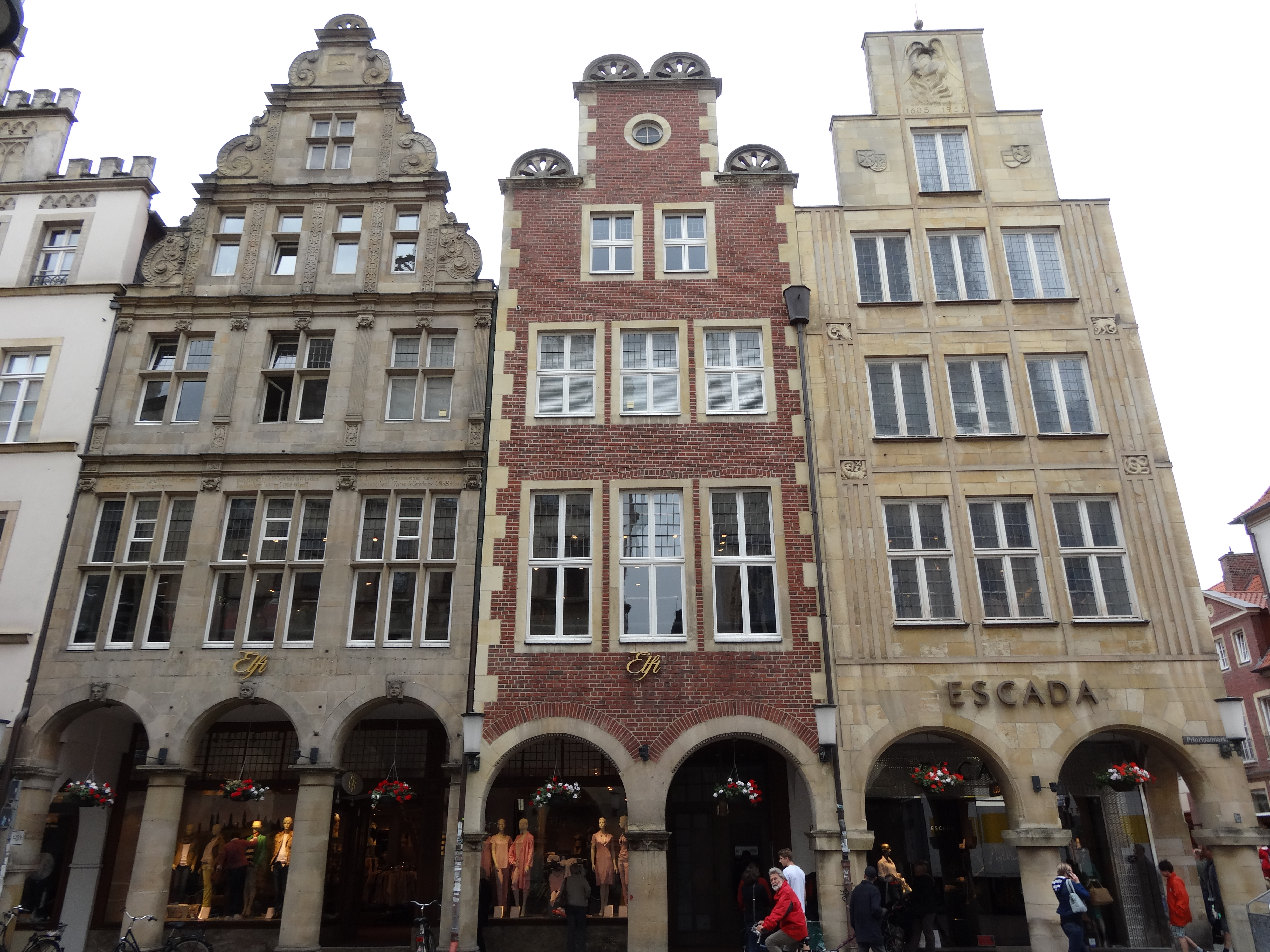 Münster, Germany